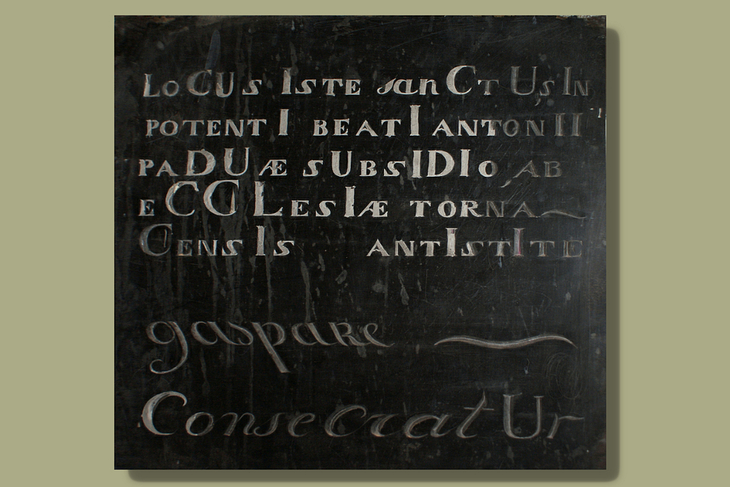 St-Antonius van Paduakerk te Charleroi - Gedenksteen van de consecratie in 1837 door Mgr. Gaspard-Joseph Labis (bewerkte fotomontage)